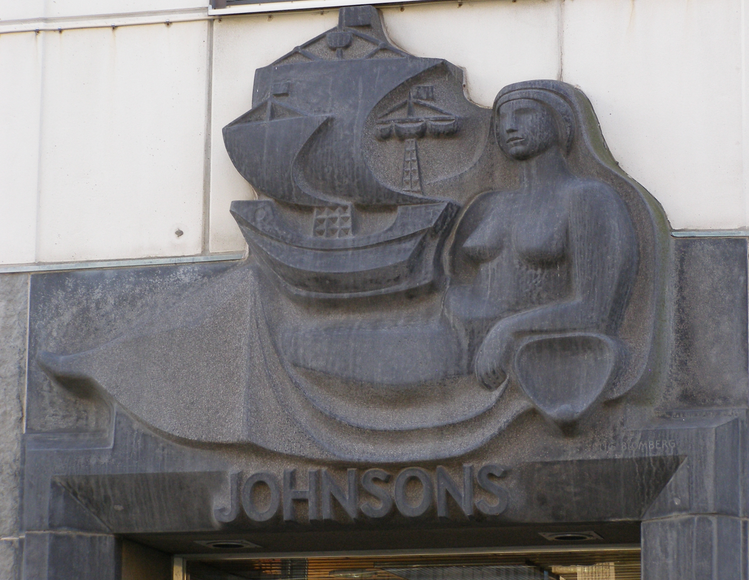 Göteborg - detal kamienicy przy Östra hamngatan 7